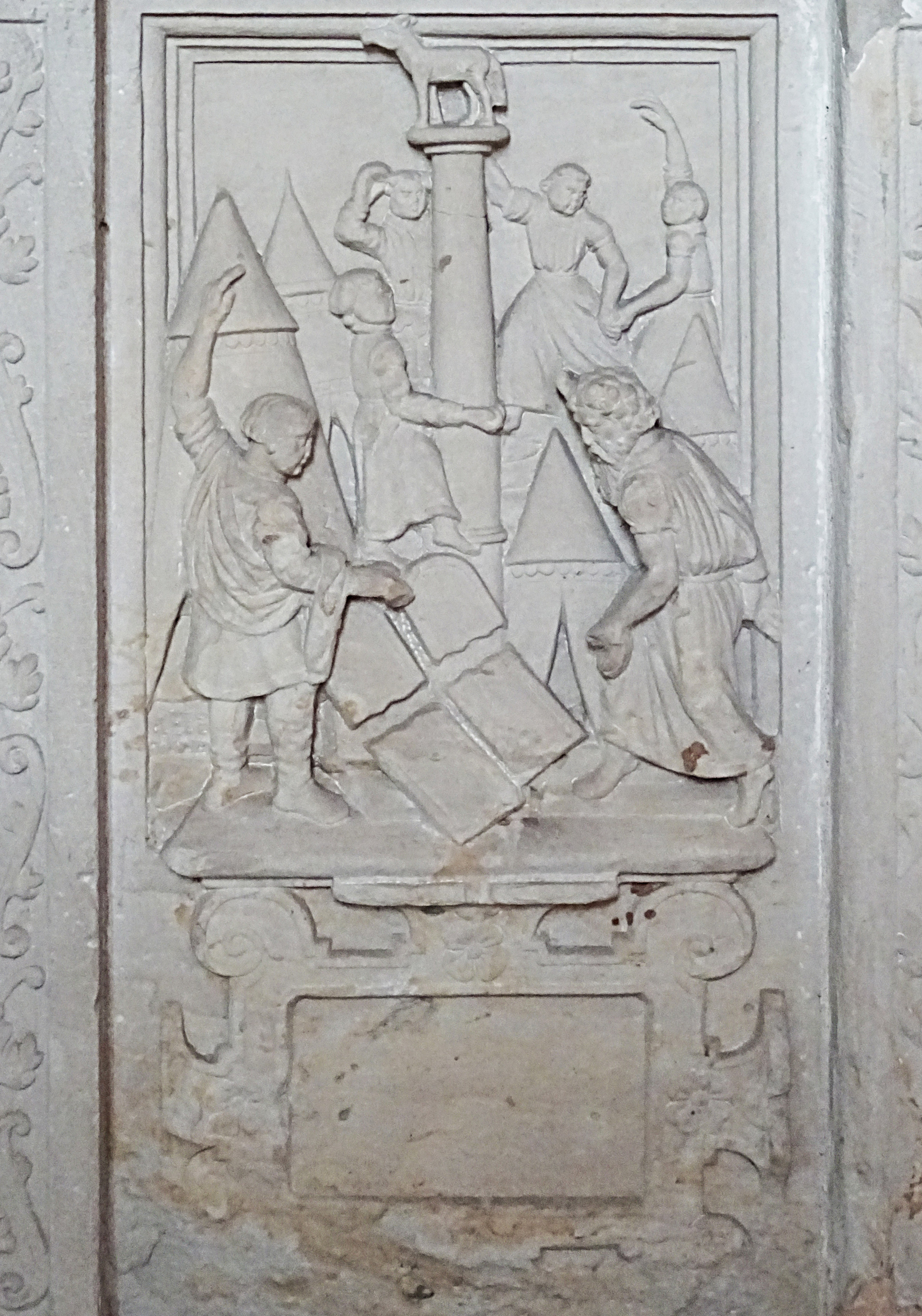 Steinbilderbibel in der St. Annenkirche (Eisleben), 18/29, Der Tanz um das goldene Kalb und die zehn Gebote